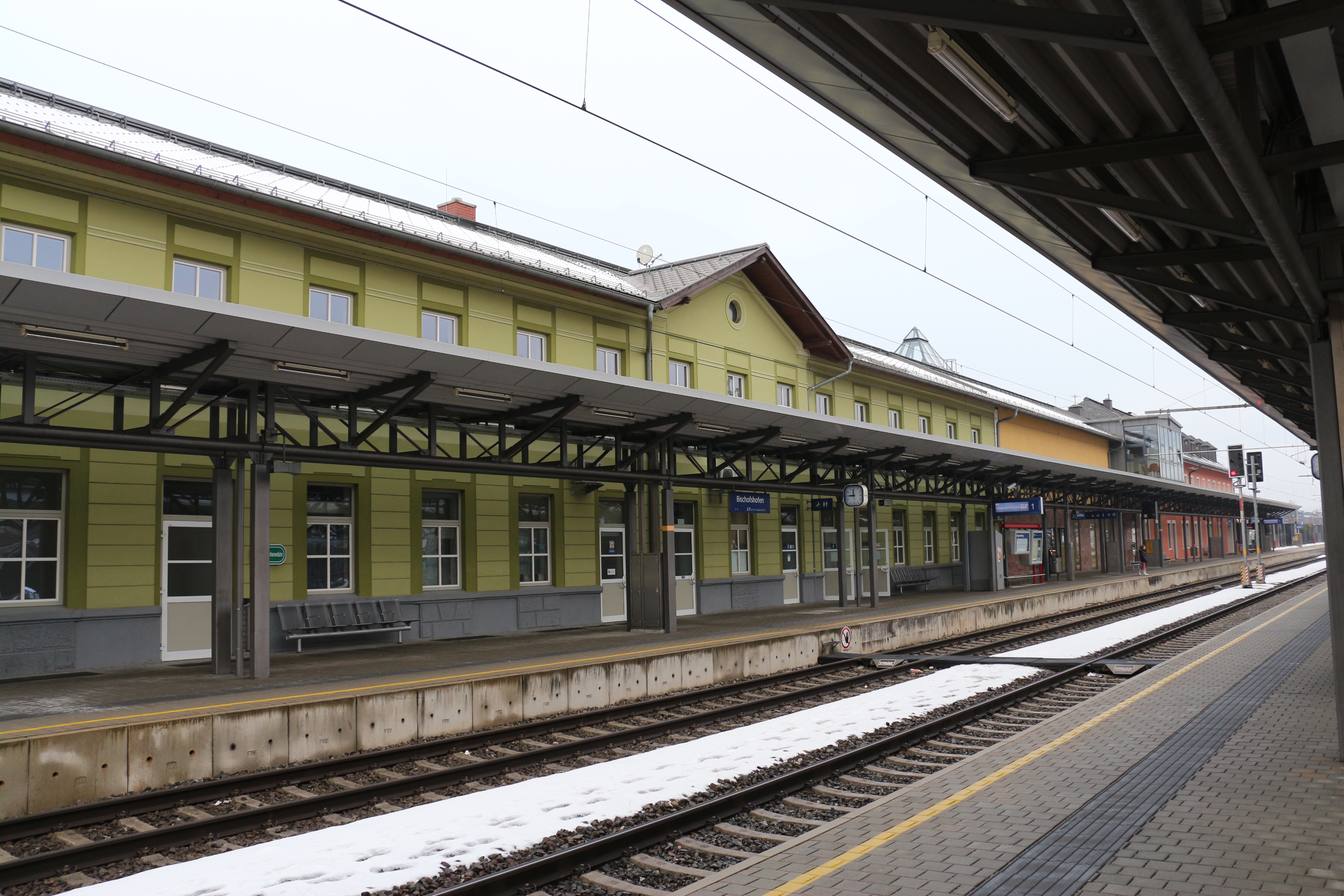 Bahnhof Bischofshofen, 21. Dezember 2013